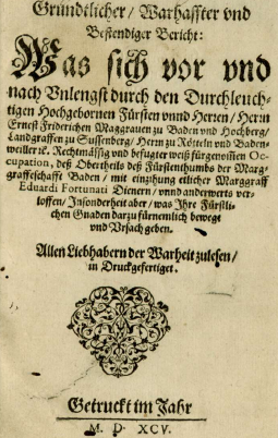 Denkschrift des Markgrafen Ernst Friedrich von Baden Durlach zur Okkupation der oberen Lande der Markgrafschaft Baden-Baden 1594